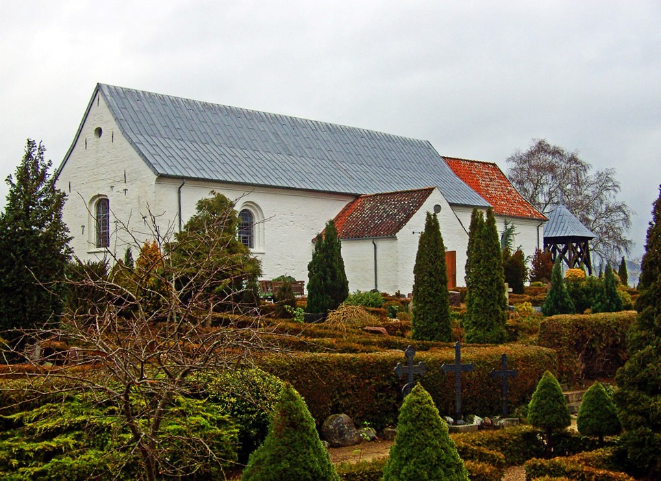 fra nordøst